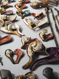 Pipes Gabinet col·leccionista - Fot. Victor Oliva.jpg